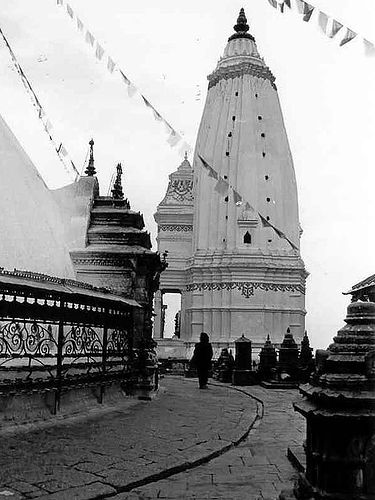 A stupa in Swayambhunath Temple, Kathmandu, Nepal